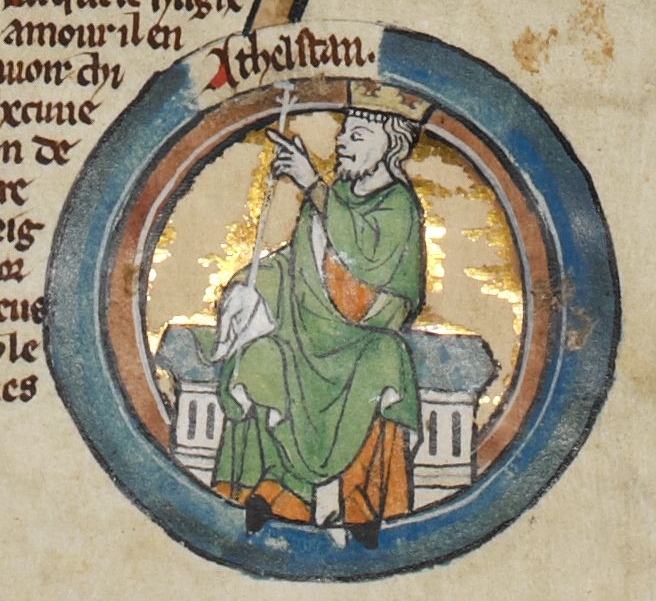 Miniature d'Æthelstan d'Angleterre dans une généalogie royale du XIVe siècle.